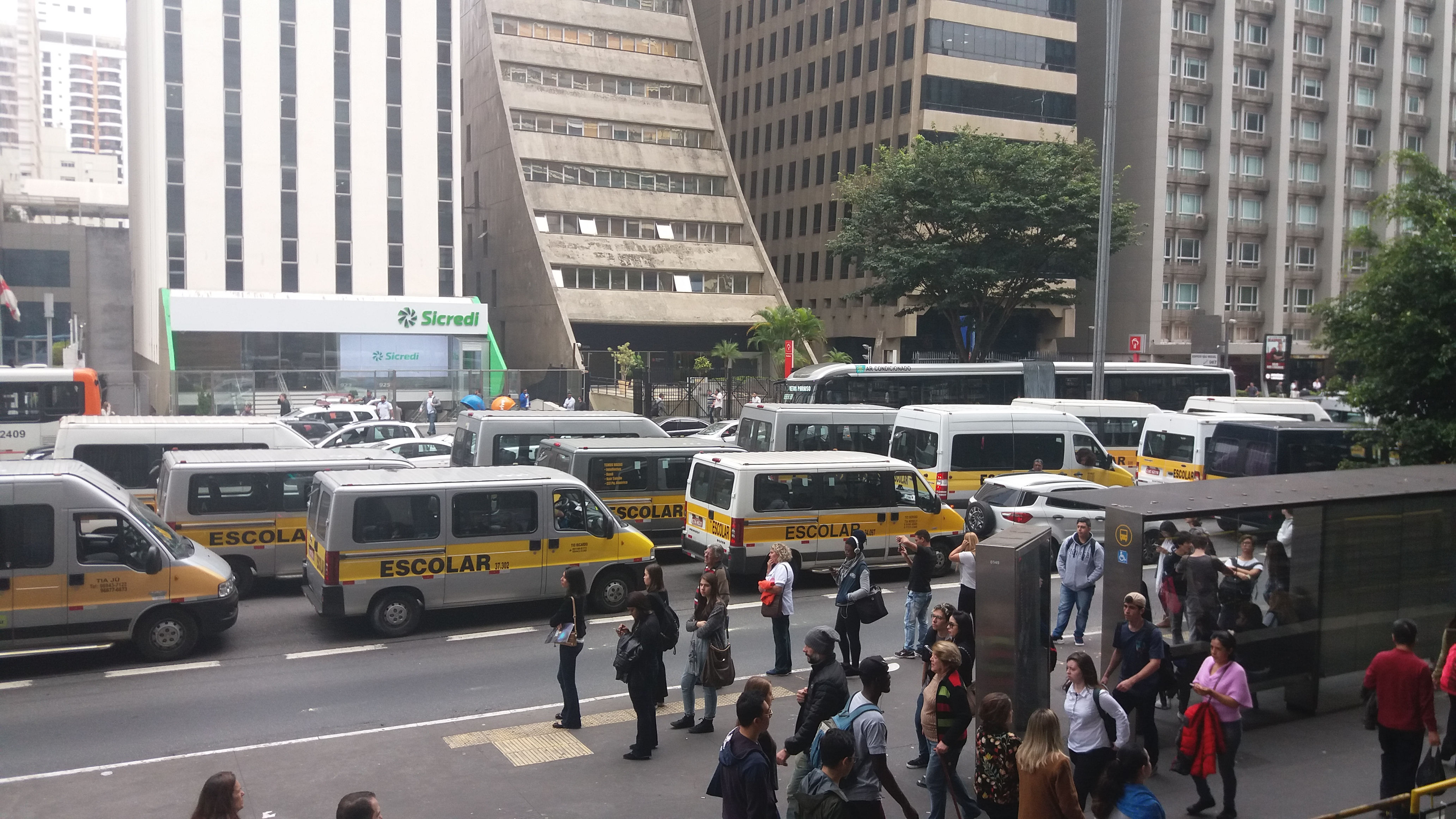 Protesto com vans escolares paralisa a Avenida Paulista